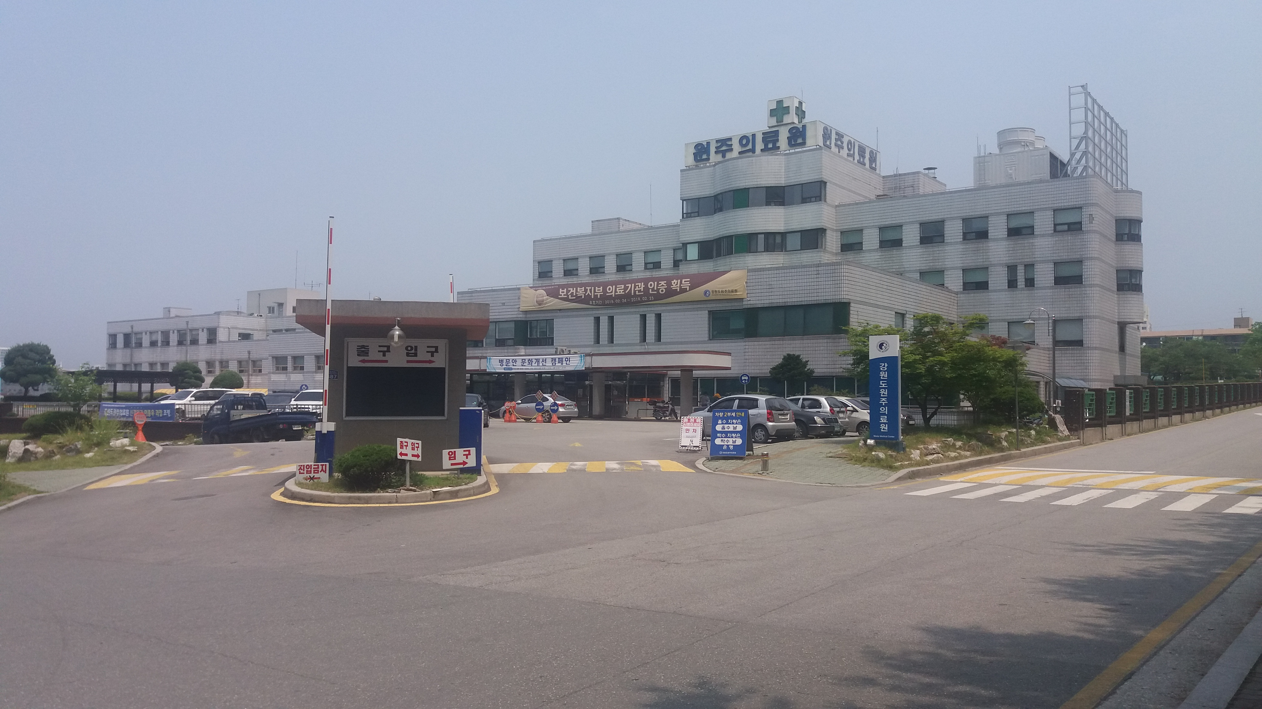 강원도원주의료원